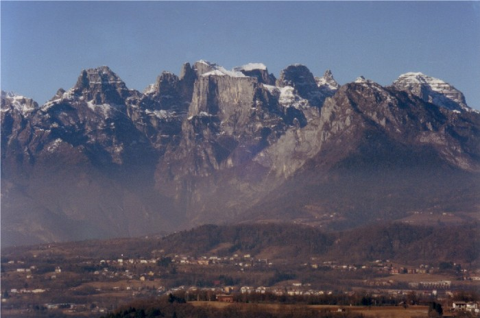 Autore: Ettore Dal Farra Descrizione: I Monti del Sole (Dolomiti Bellunesi, Parco Dolomiti Bellunesi) visti da sud-est Licenza d'uso: pubblico dominio